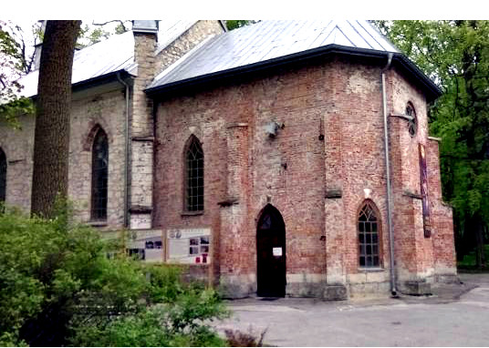 Busko-Zdrój, ul. 1 Maja - kaplica św. Anny w parku zdrojowym, obecnie kościół filialny (zdrojowy), 1884-1886, 1907 (tylne wejście)